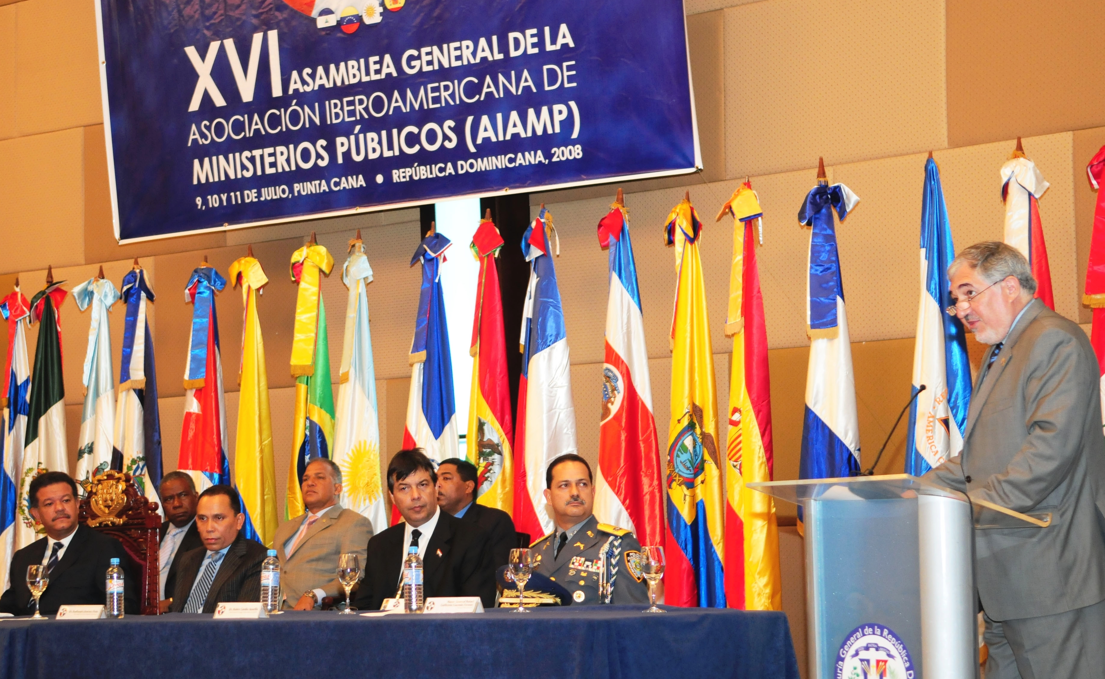 Acto de inauguración de la Asamblea de la Asociación Iberoamericana de Ministerios Públicos en la República Dominicana en el año 2008